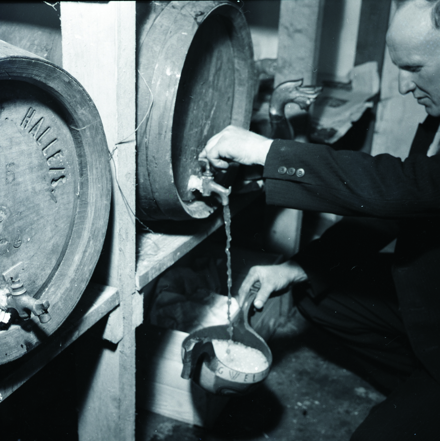 Tradisjonelt bryllup i Ulvik i Hardanger i mai 1954.